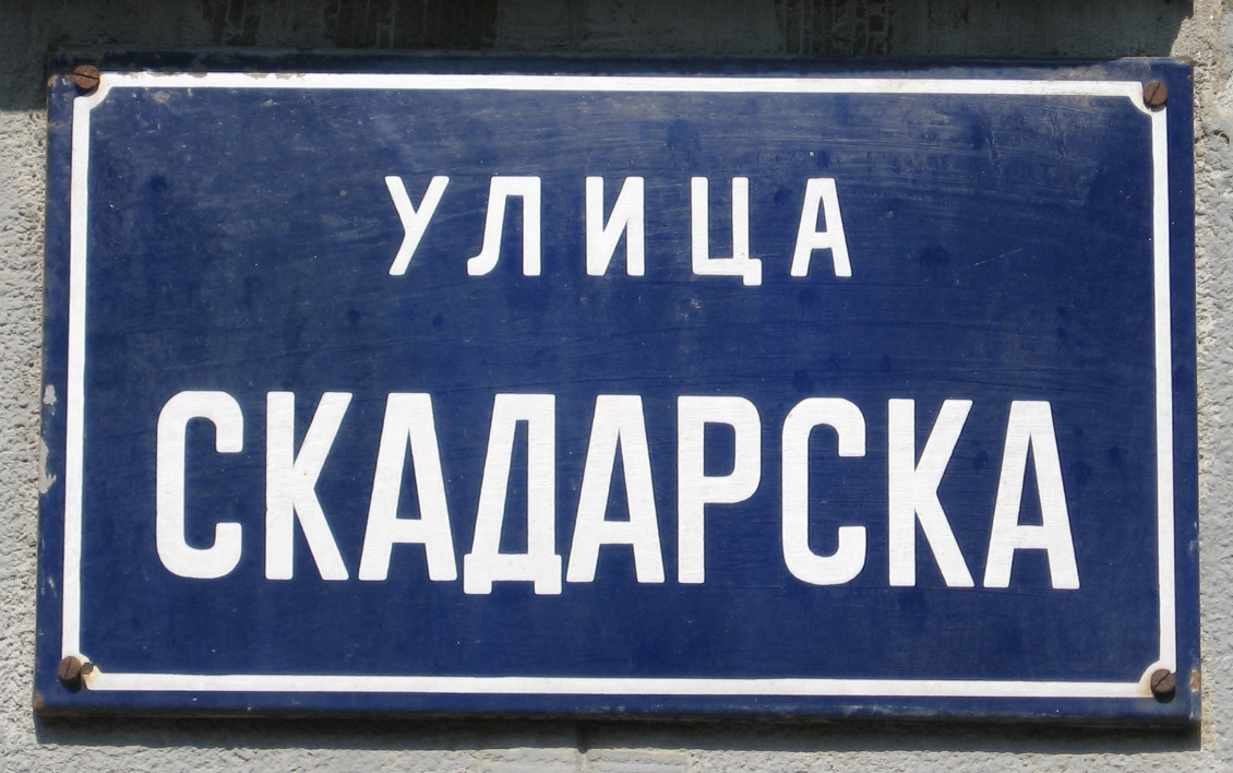 Skadarlija (Beograd) Street Sign